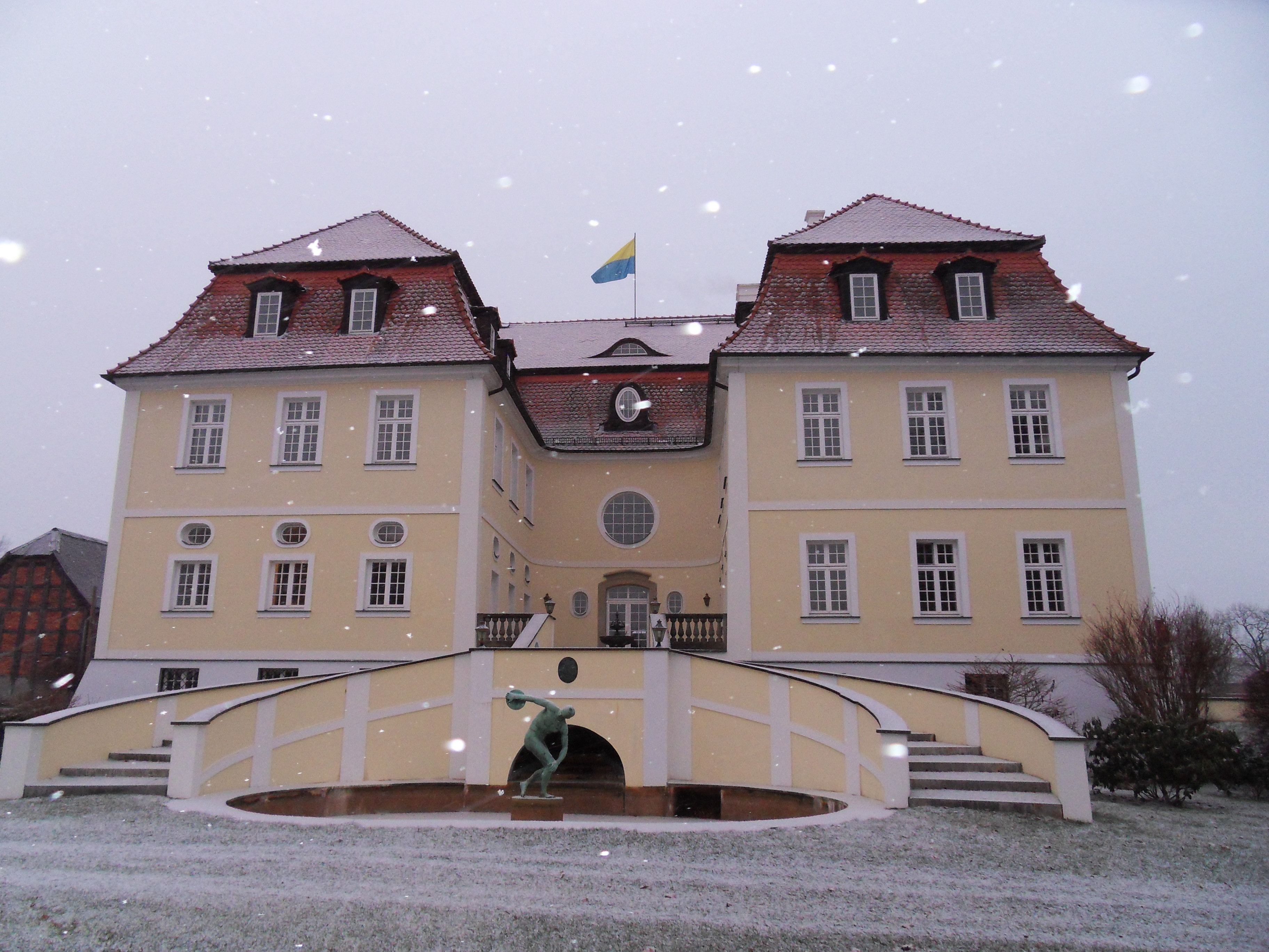 Schloss Stechau. Die Familie Gontard, welche seit 1899 Besitzer des Rittergutes in Stechau waren, wurden 1945 mit der Bodenreform zwangsenteignet. Nach der Wende, 1992 kaufte der Münchner Rechtsanwalt Dr. Bardia Khadjavi-Gontard das Schloss mit einigem Grundbesitz. Dieser investierte einen zweistelligen Millionenbetrag in das Schloss und brachte das Gut zu neuem Glanz.